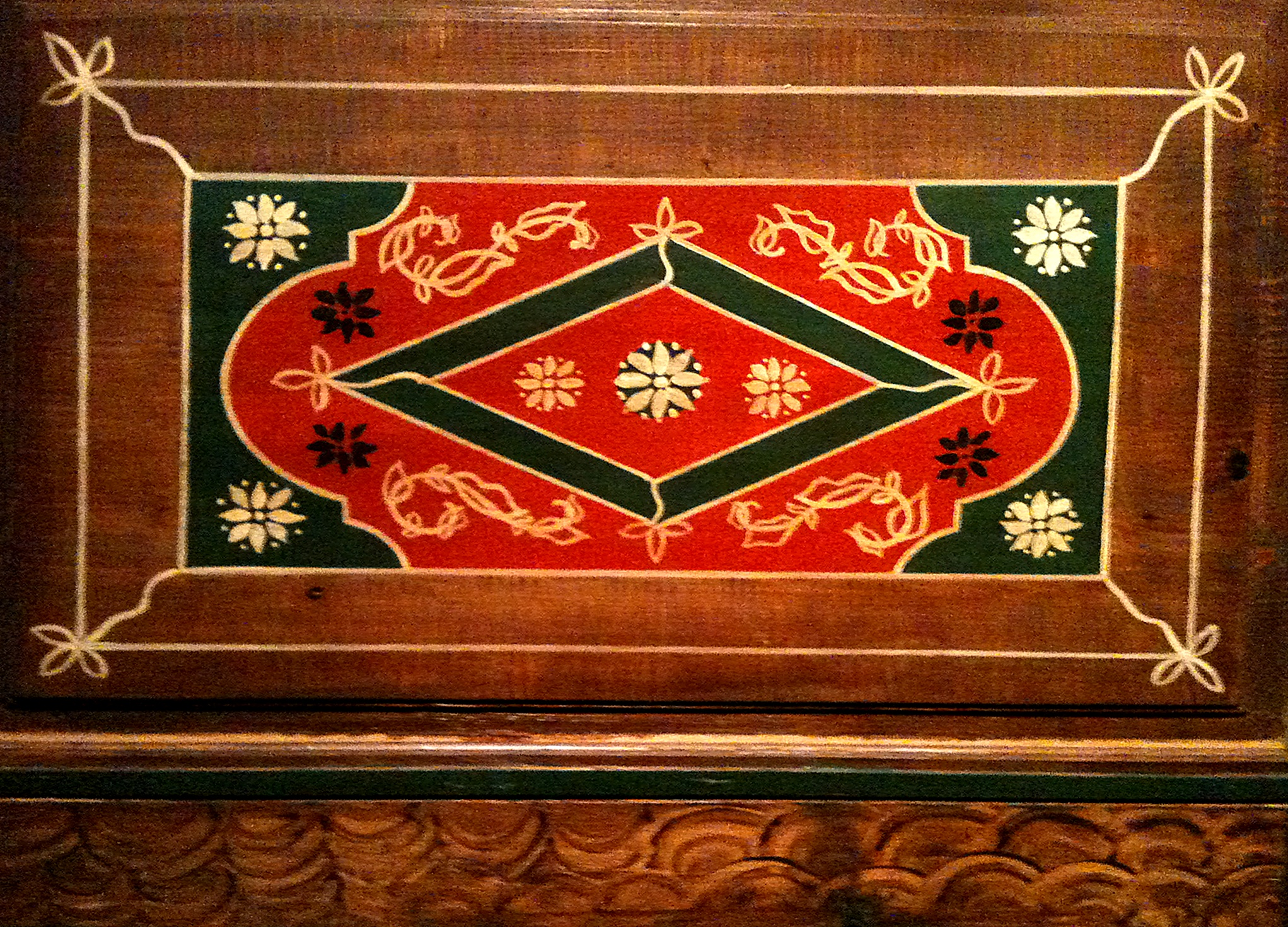 polychrome de Gottesheim